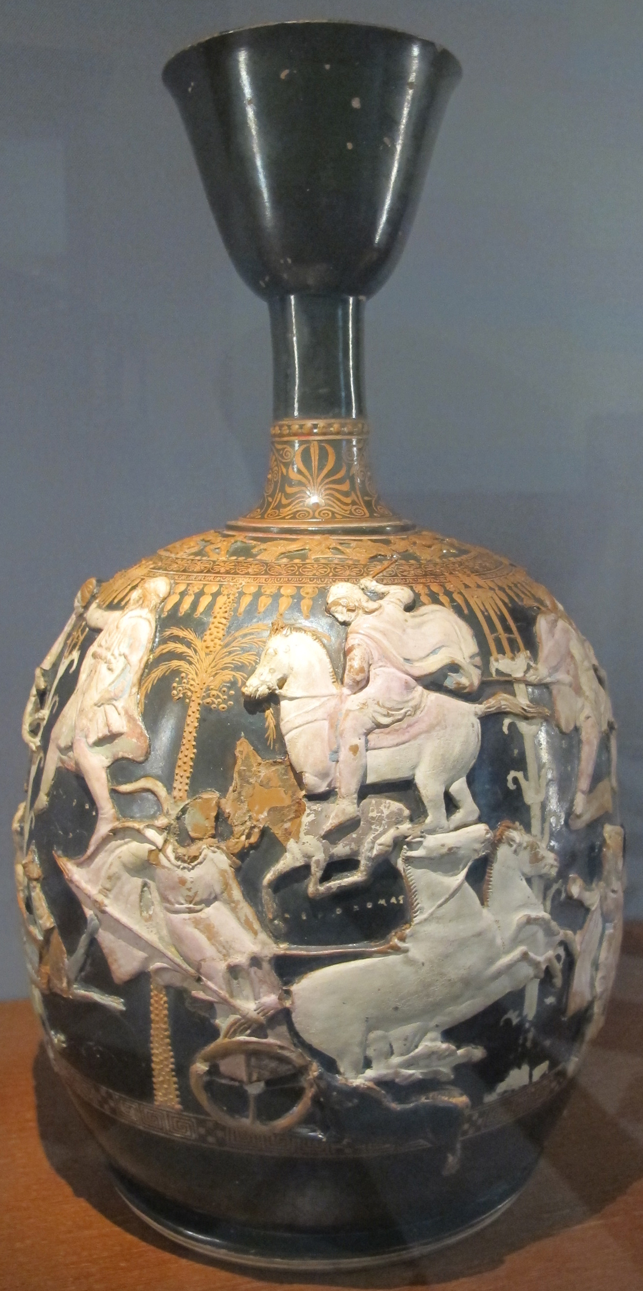 Grande lekythos xenophantes con caccia fantastica, attica 390-380 ac. ca.